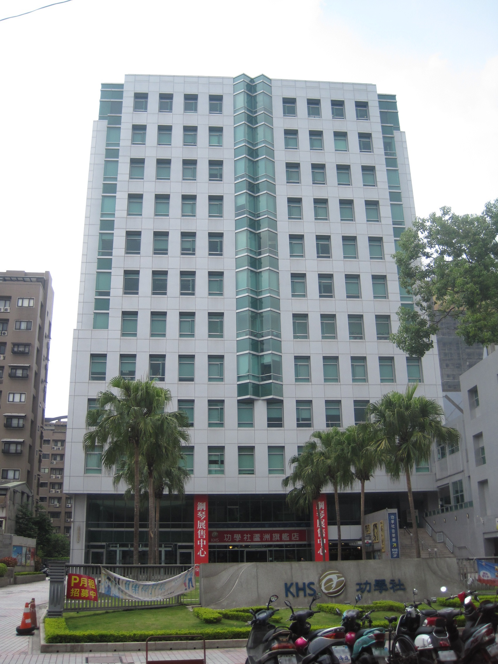 功學社企業總部營運大樓，地址：新北市蘆洲區中山二路162號。